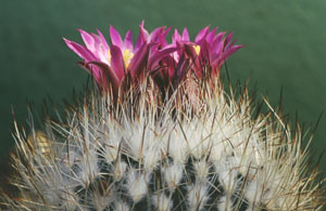 Turbinicarpus beguinii aus der Sammlung von „Andreae Kakteenkulturen“, Inh. Michael Januschkowetz, Ausserhalb Lengfeld 17, 64853 Otzberg-Lengfeld